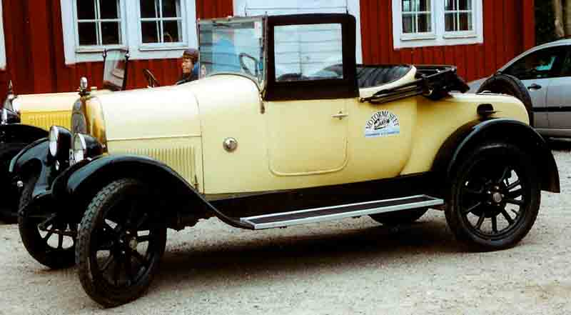 Fiat 501 Spider 1925